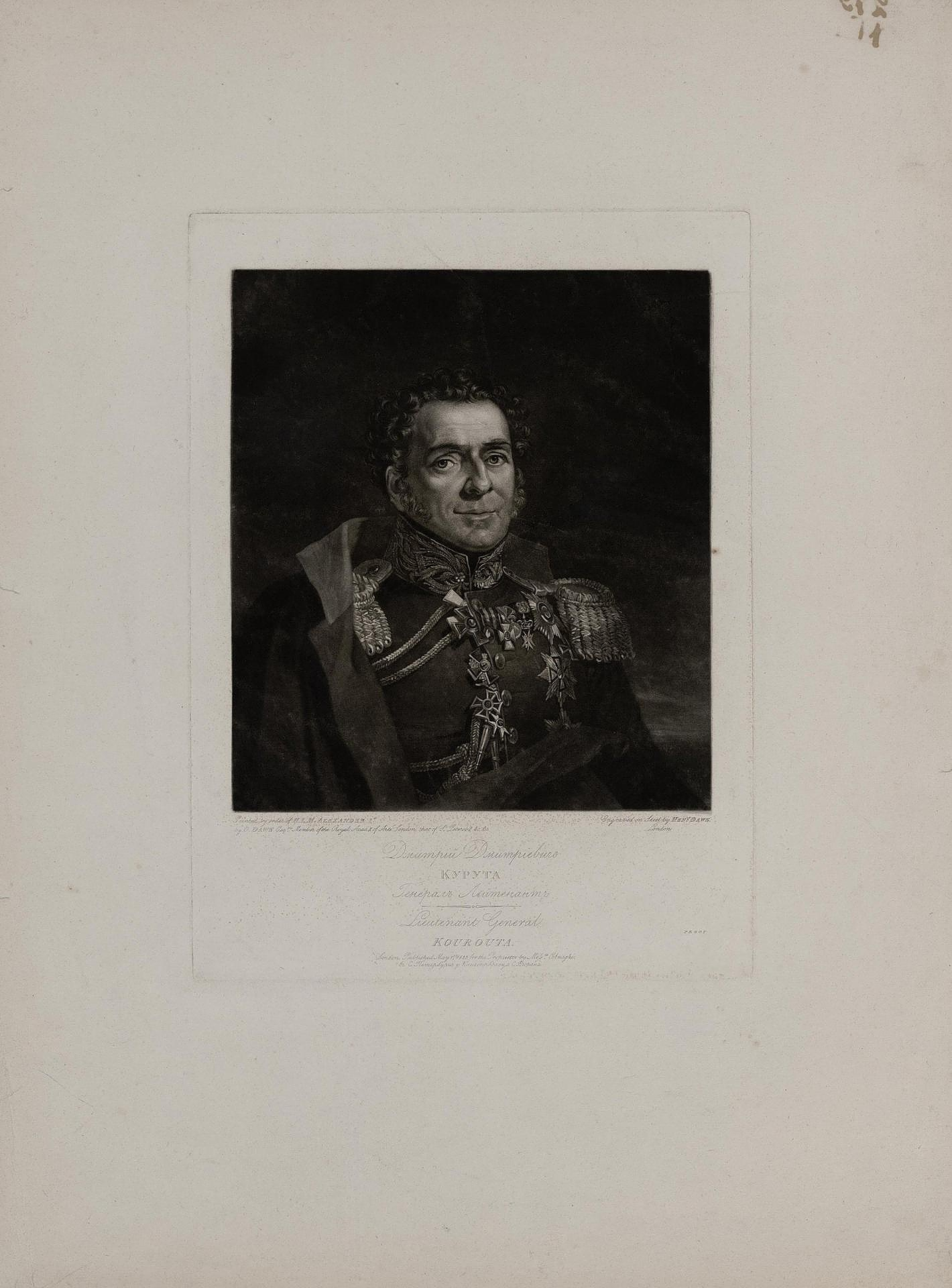 Портрет Дмитрия Дмитриевича Куруты (1769-1833)